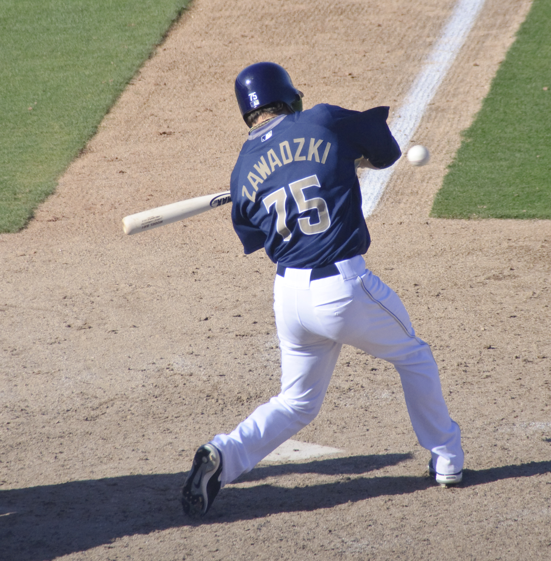 Lance Zawadzki